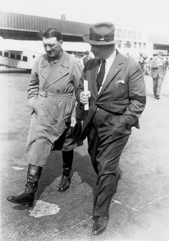 Adolf Hitler, Führer und Reichskanzler des Deutschen Volkes! Eine Aufnahme aus der Zeit seines Kampfes um das Deutsche Volk. Der Führer auf einer Wahlreise durch Deutschland bei seiner Ankunft auf dem Flughafen Berlin-Tempelhof mit dem preußischen Ministerpräsidenten Hermann Göring. 1 1/2 Millionen Kilometer hat der Führer Adolf Hitler während seines Kampfes um die Erringung des Deutschen Volkes zurückgelegt.